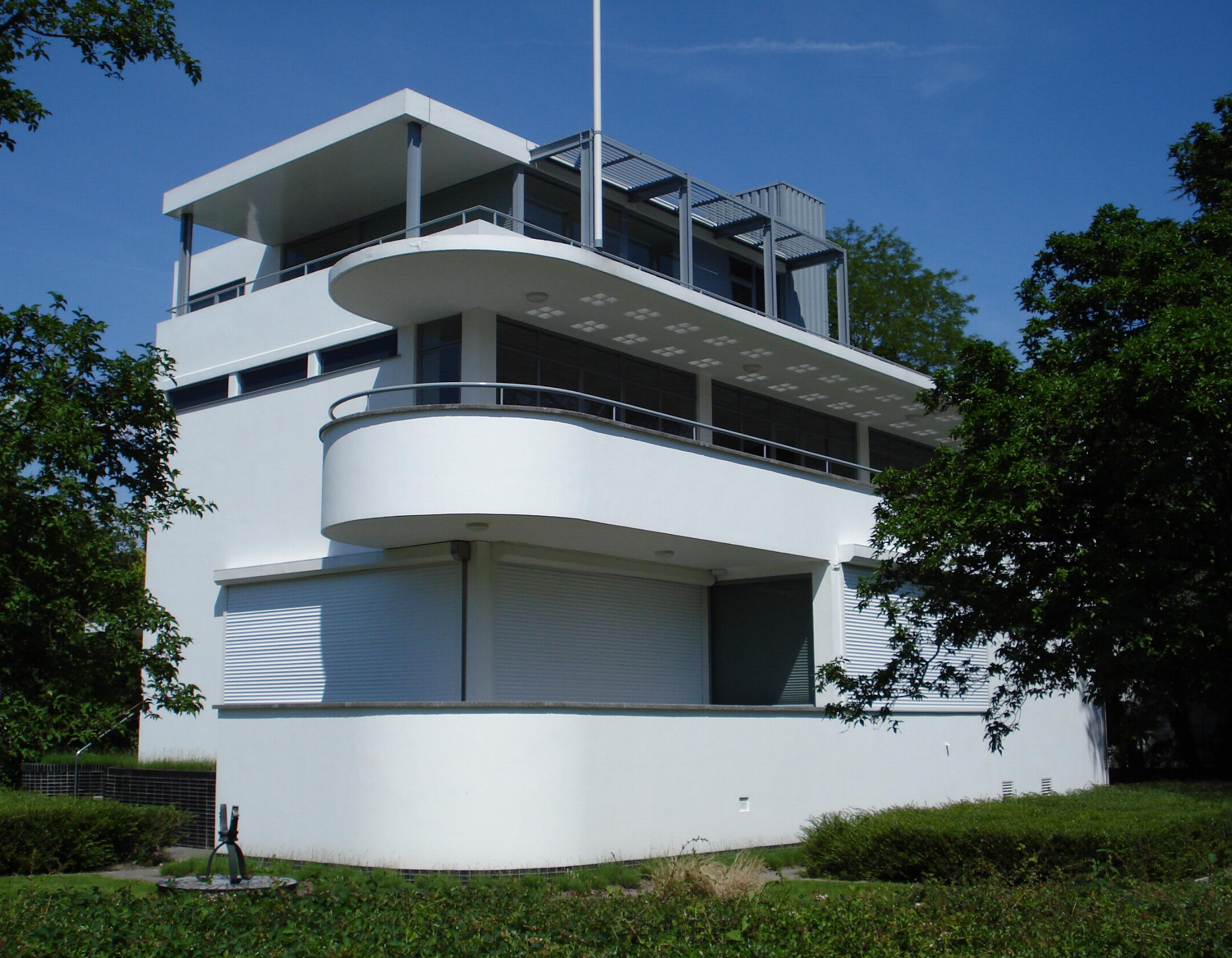 Rotterdam, Museumpark 11. Rijksmonument.